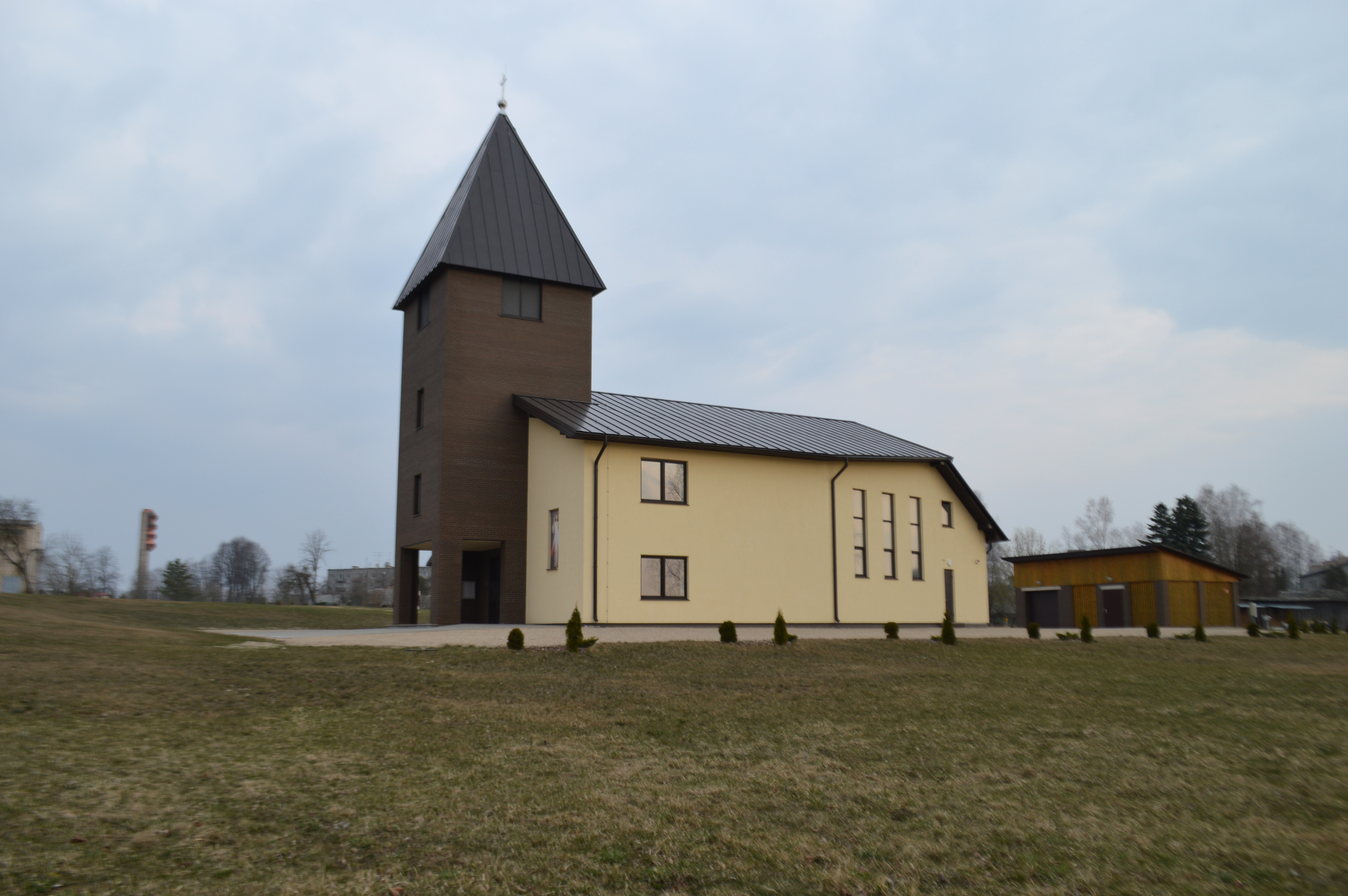 Latgaļu: Vīseitys Romys katuoļu bazneica.